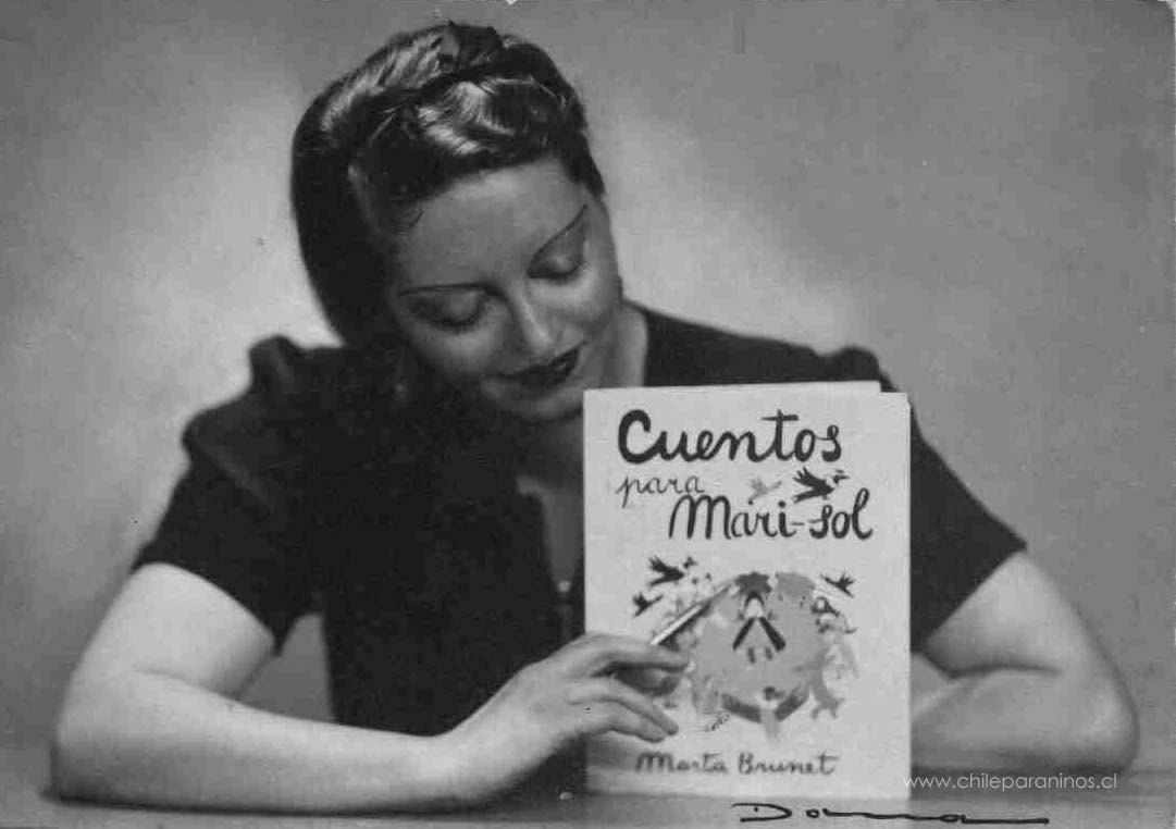 Marta Brunet presentando su libro Cuentos para Marisol, 1938